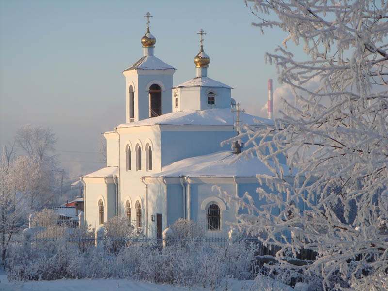 Храм Покрова Божией Матери в Назарово (Назаровское Благочиние Красноярской Епархии Русской Православной Церкви). Город Назарово, улица Арбузова, дом 10.